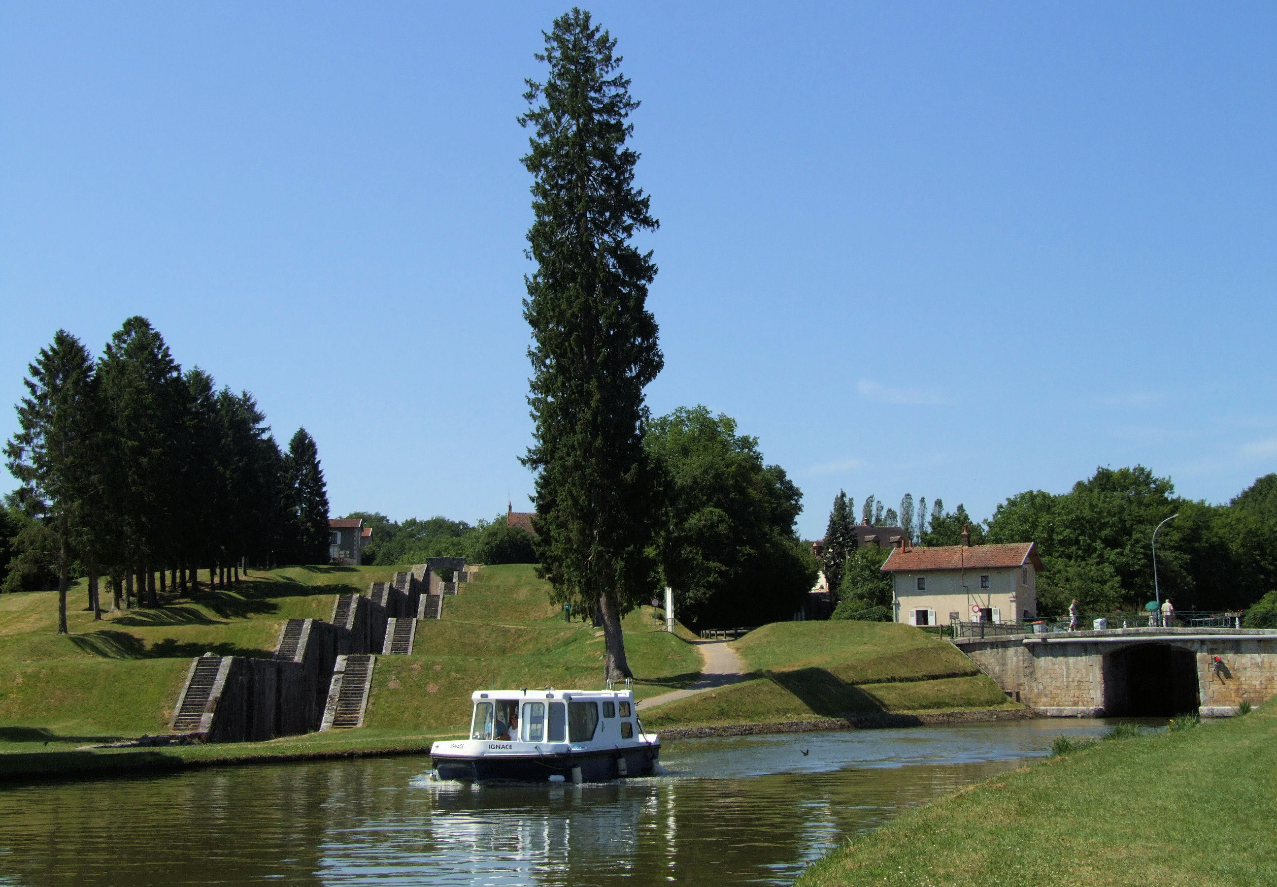 Canal de Briaire - Les deux tracés du canal à Rogny-les-Sept-Ecluses avec l'ancienne échelle d'écluses